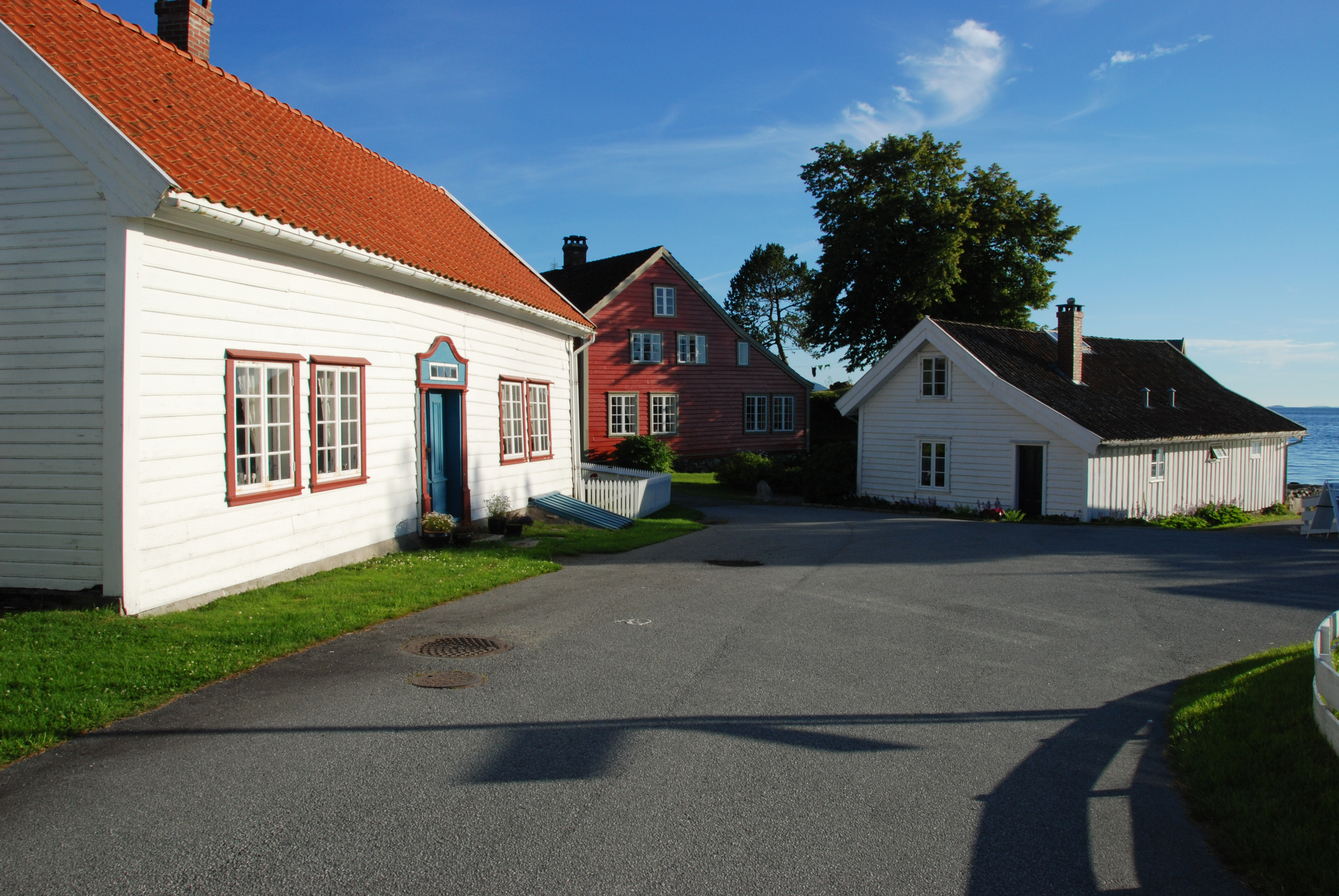 Jelsa. Bildet er tatt like ved "gamle banken"